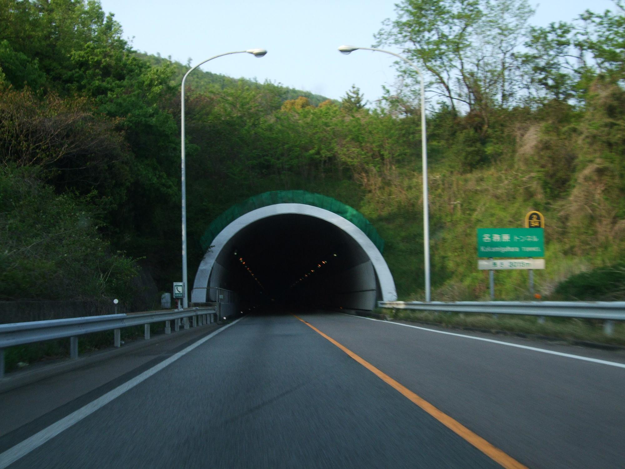 東海北陸自動車道 各務原トンネル 下り線 2008.4.27 投稿者が撮影